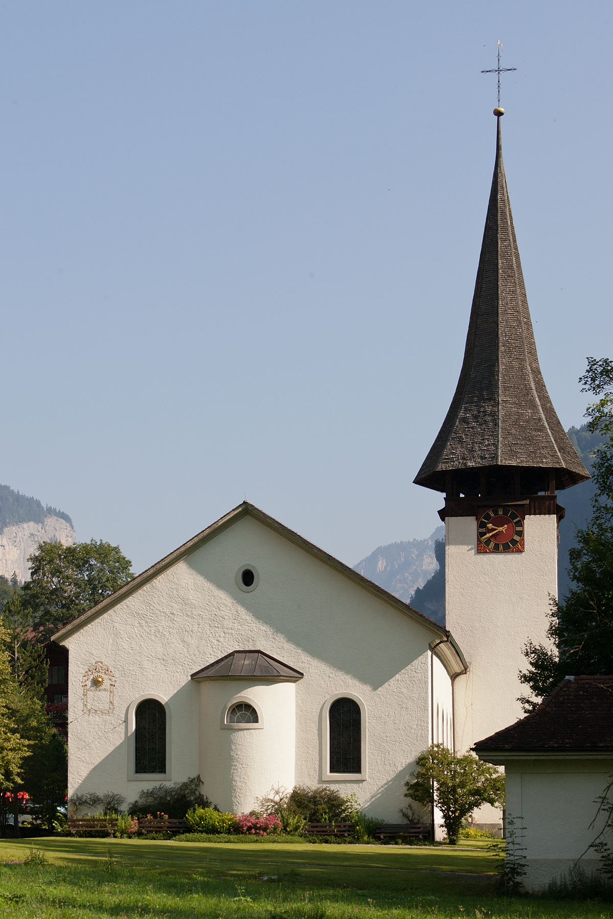 Kirche in Lauterbrunnen (BE)